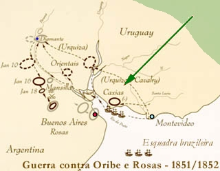 Mapa final del sitio de Montevideo y la Guerra Grande trabajo propio basado en :Imagen:Guerra contra Oribe e Rosas.jpg, fuente libre del ejercito brasilero pruxo 2007